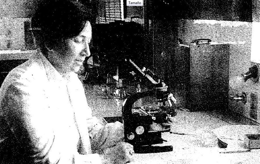 Dra. Blanca Renée Arrillaga en su laboratorio, años 60.